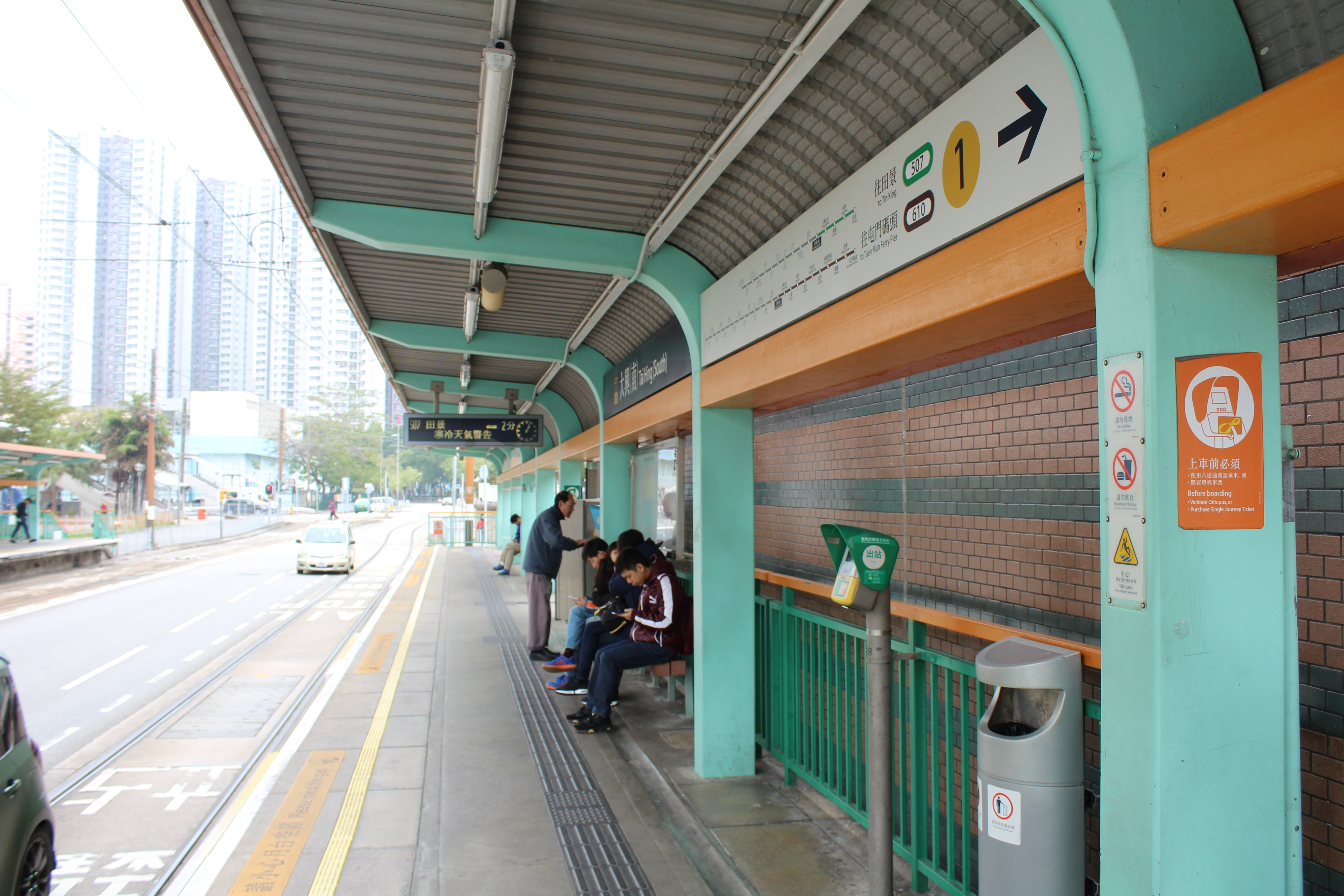 大興（南）站1號月台